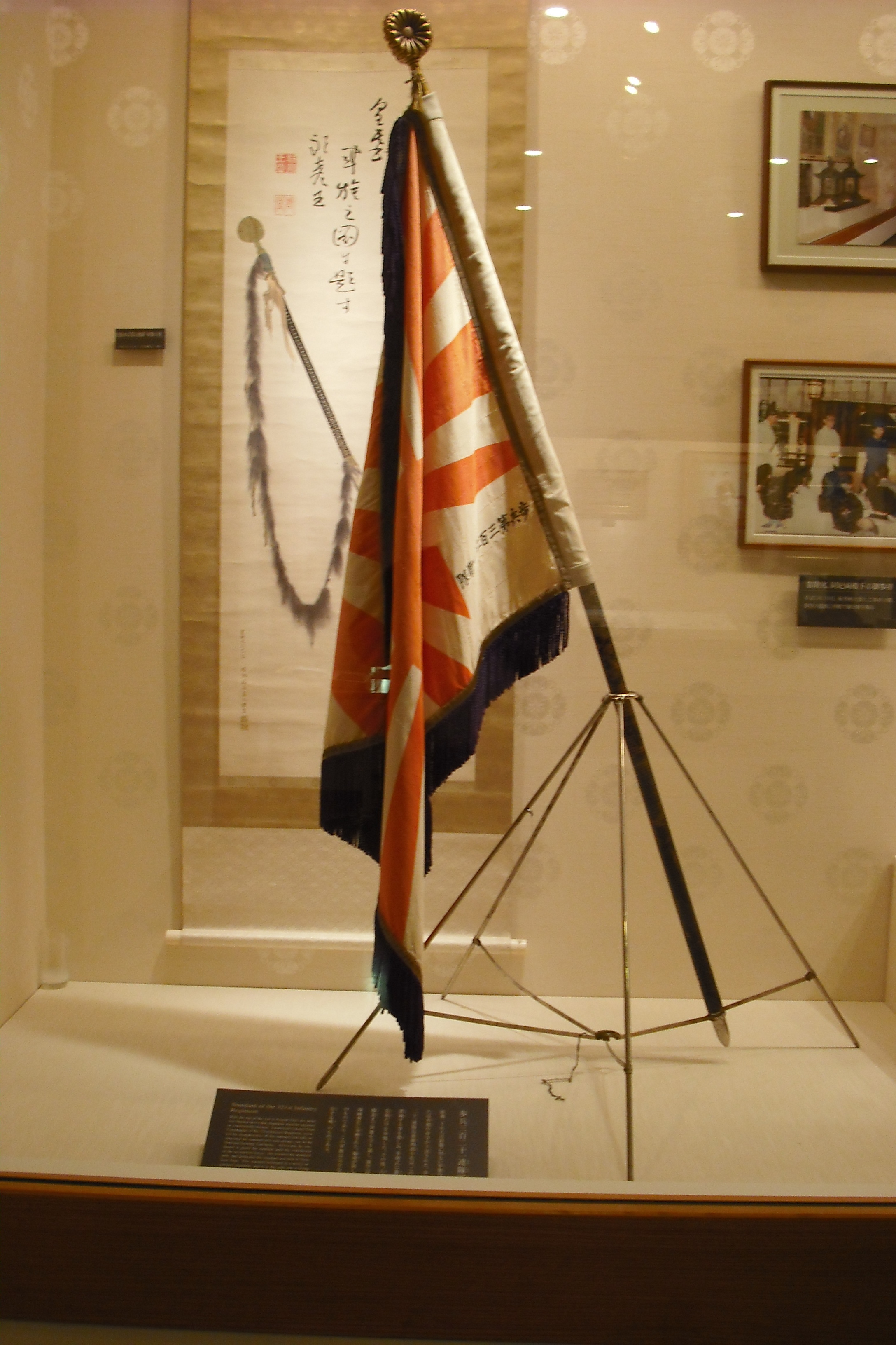 場所亡失、旧日本軍軍旗（旭日旗）どこかの博物館だった記憶がありますが、細部不明